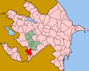 Map of Azerbaijan showing Qubadli (Qubadlı) rayon.